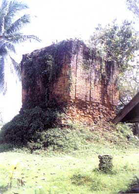 ปราสาทวัดเจ๊กโพธิ์พฤกษ์